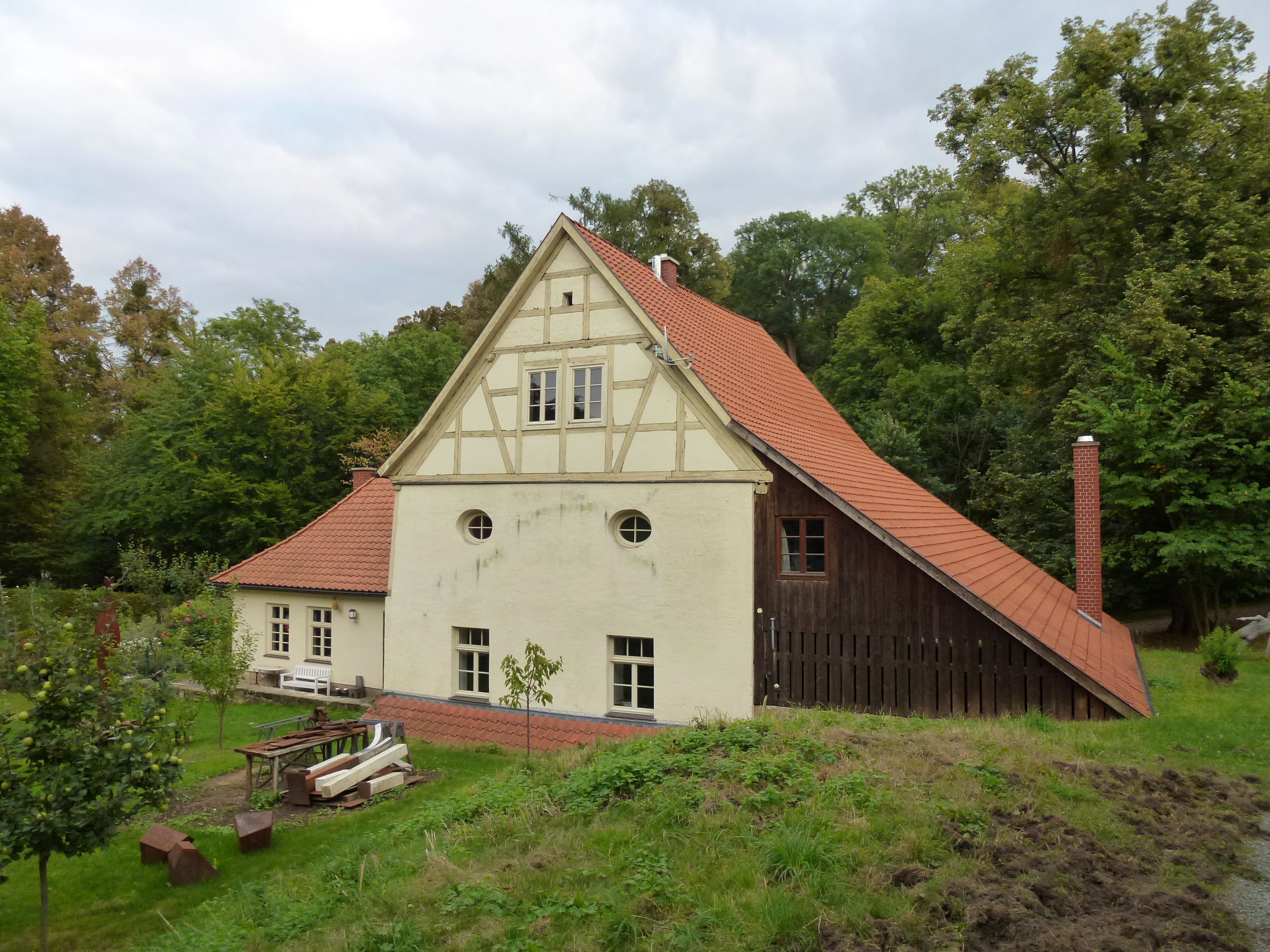 Schlossmühle Ballenstedt